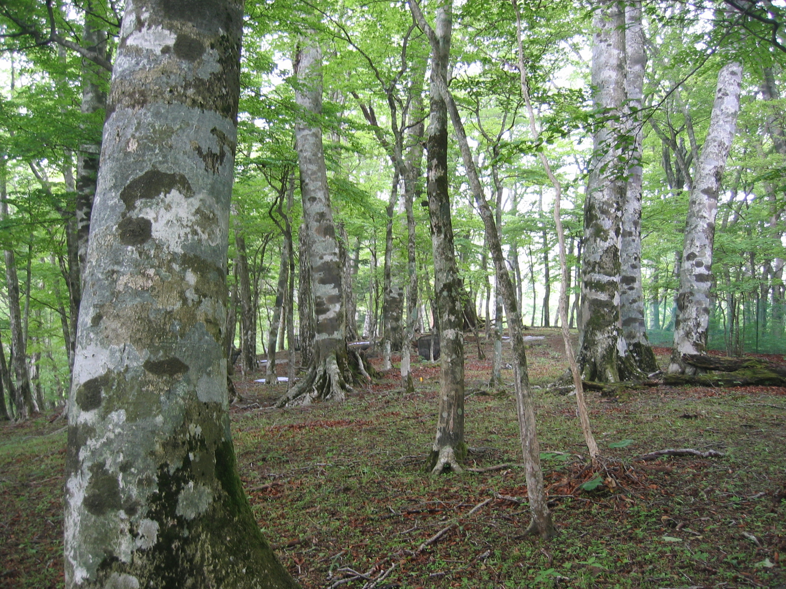 丹沢山地 堂平のブナ林